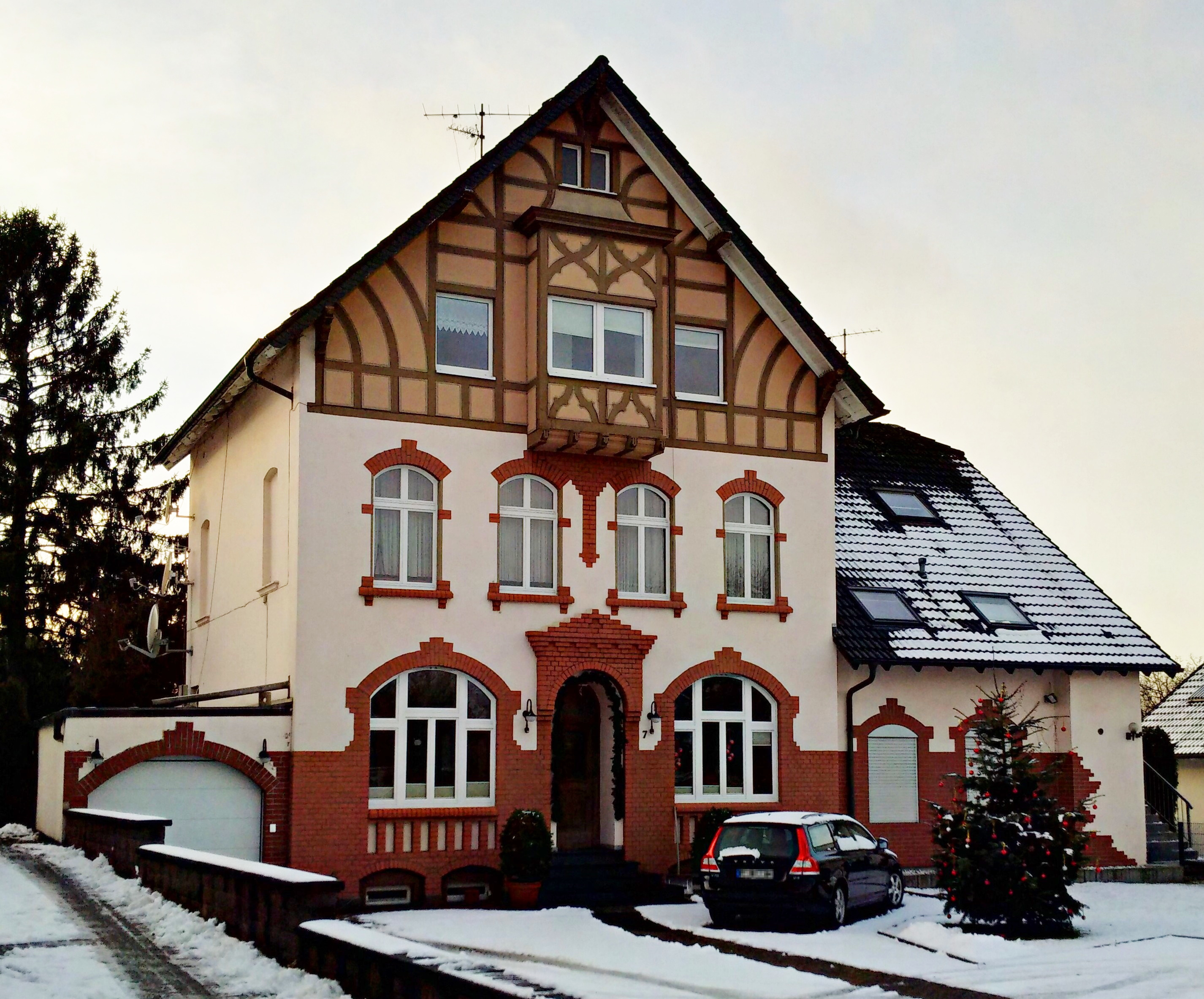 Hofschaft Hübben in Solingen, aufgenommen im Winter 2016/2017